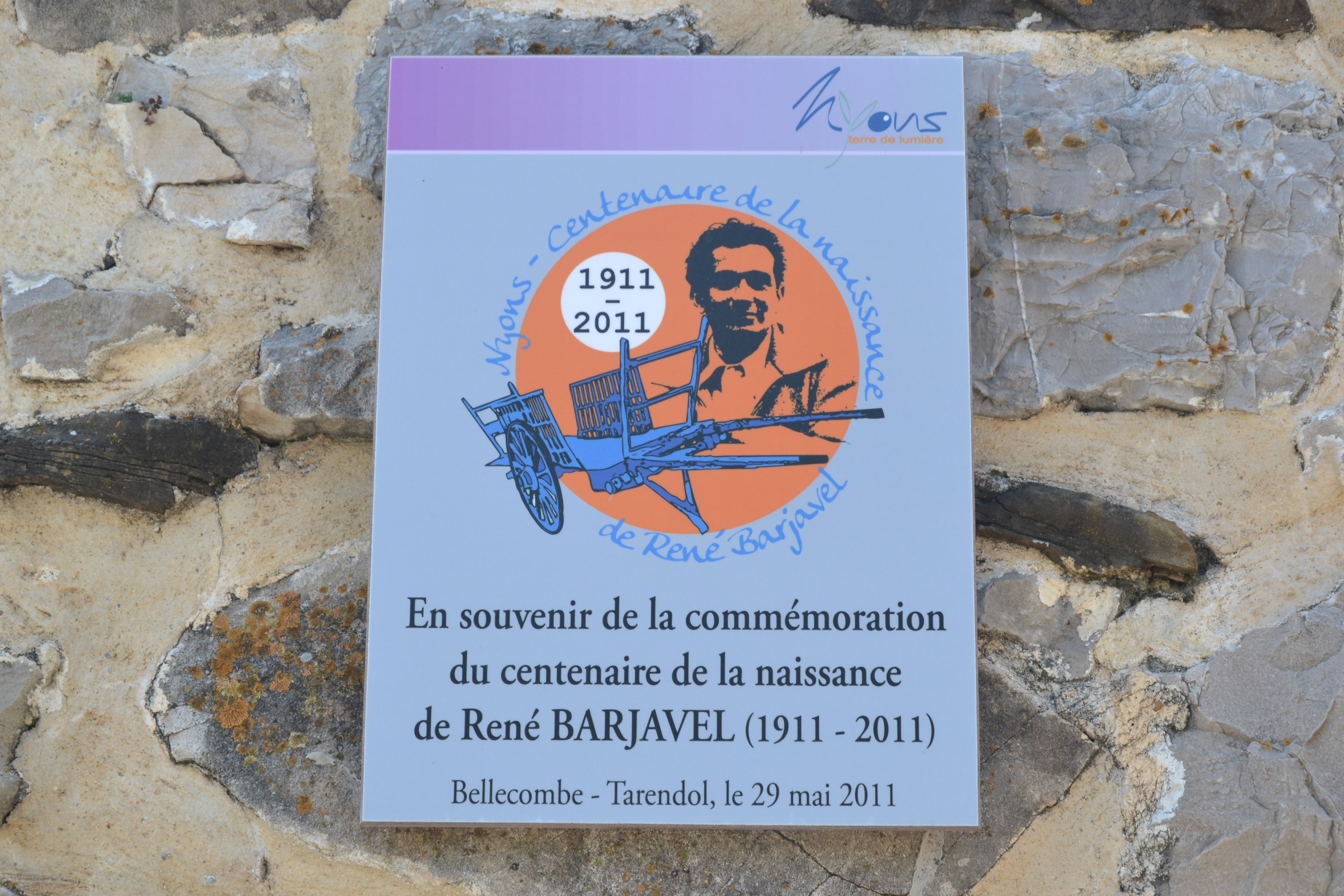 plaque en hommage de René Barjavel